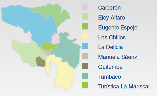 Administraciones Zonales de Quito